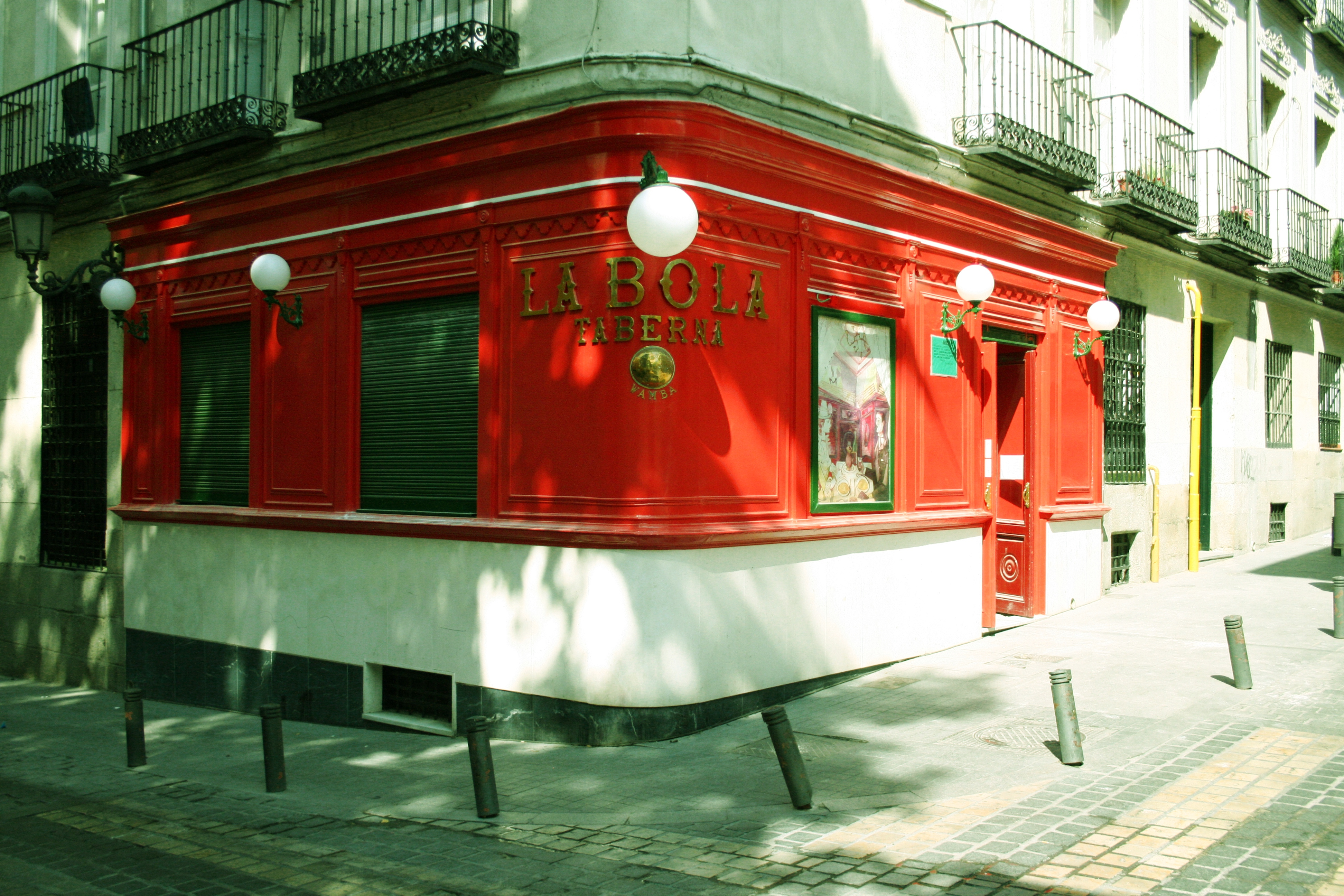 Restaurante "La Bola" (Wamba)